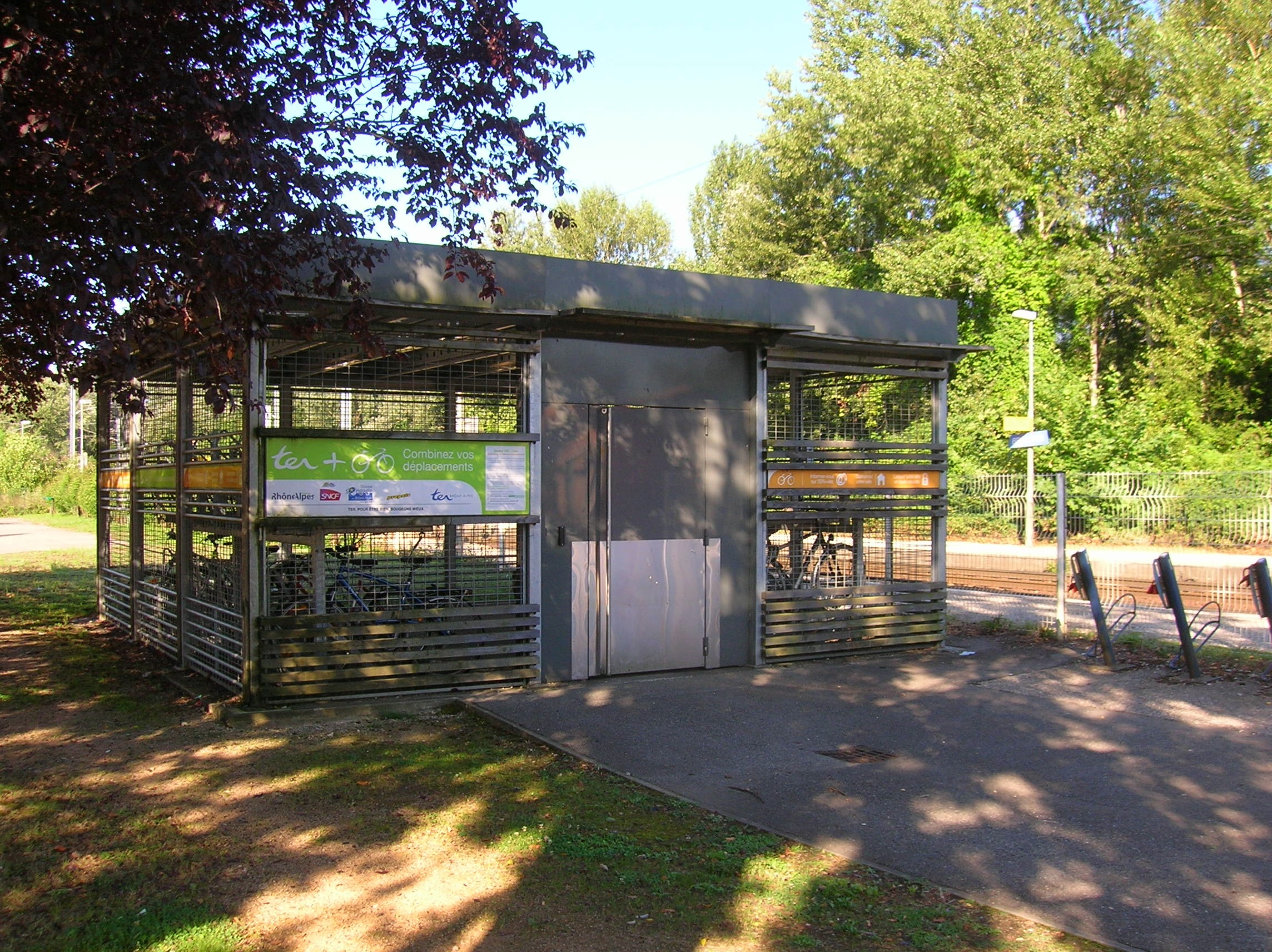 Le garage à vélo / parking - relais à la sortie de la gare de Brignoud. Brignoud, Villard-Bonnot, Isère, AuRA, France.